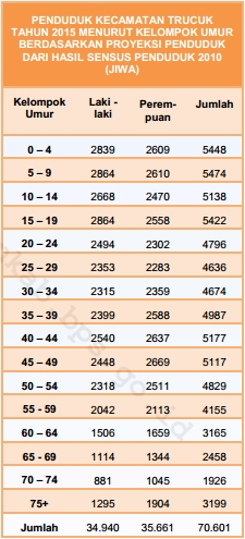 PENDUDUK KECAMATAN TRUCUK TAHUN 2015 MENURUT KELOMPOK UMUR BERDASARKAN PROYEKSI PENDUDUK DARI HASIL SENSUS PENDUDUK 2010 (JIWA)